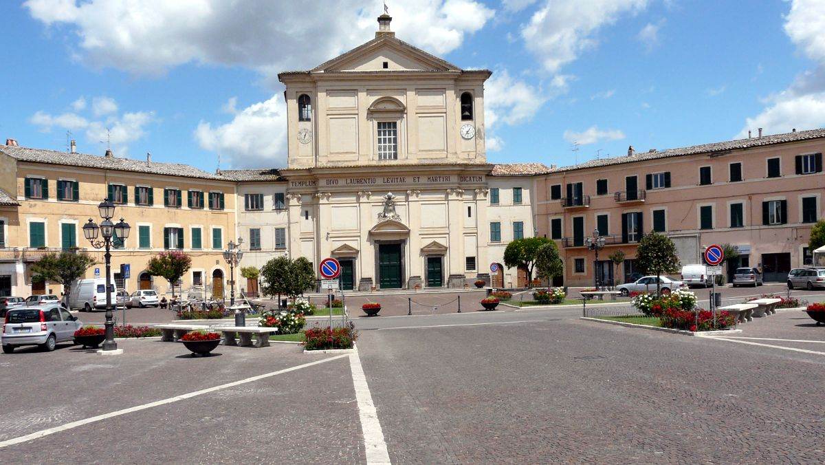 Piazza Europa in San Lorenzo Nuovo